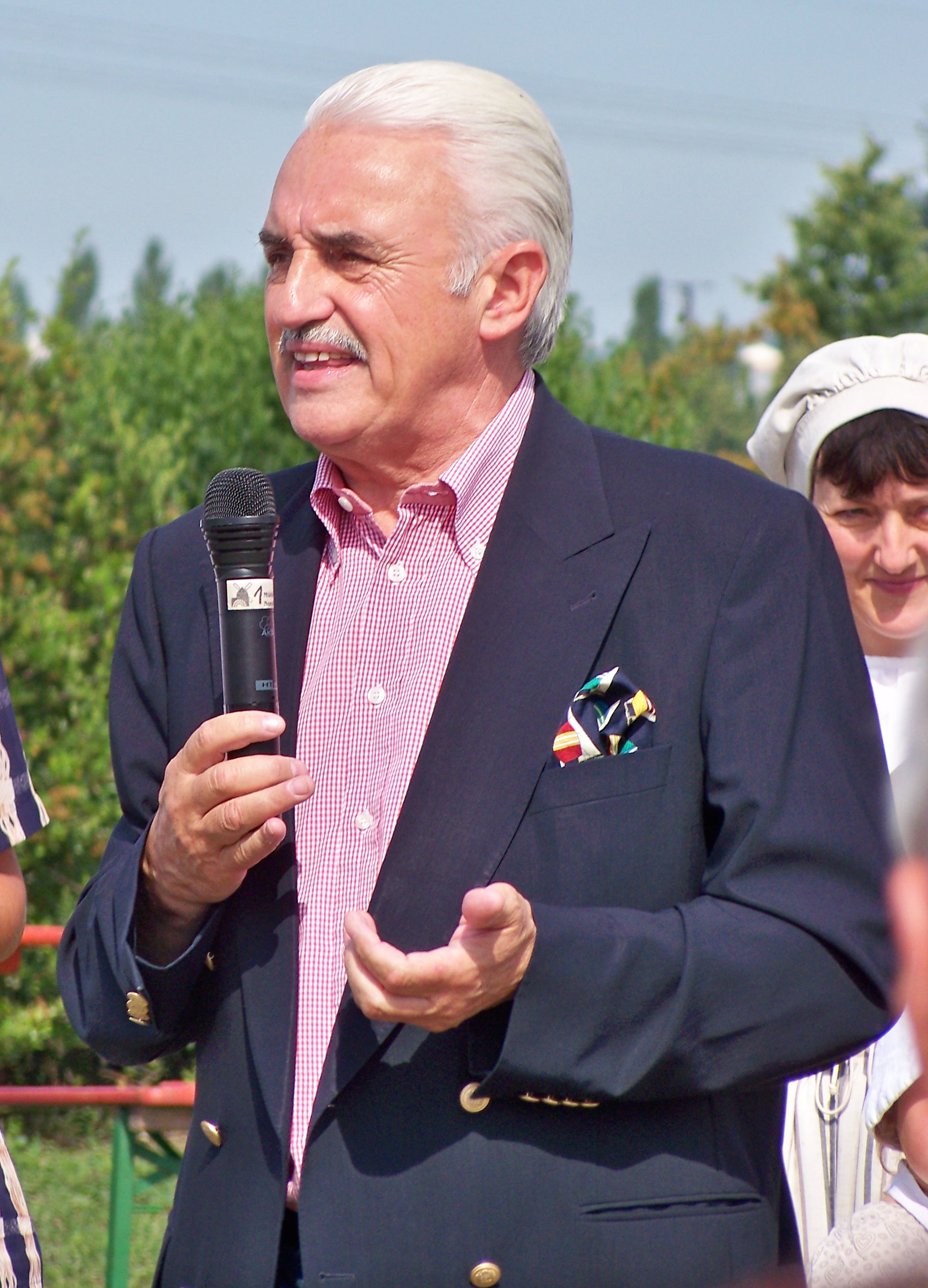 Michael Czupalla (Landrat Nordsachsen) hält eine Rede zur Eröffnung des 18. Deutschen Mühlentages in der Mühlenregion Nordsachsen am 13. Juni 2011 im Rahmen der 1050-Jahrfeier Eilenburgs vor Bechers Mühle in der Leipziger Landstraße.